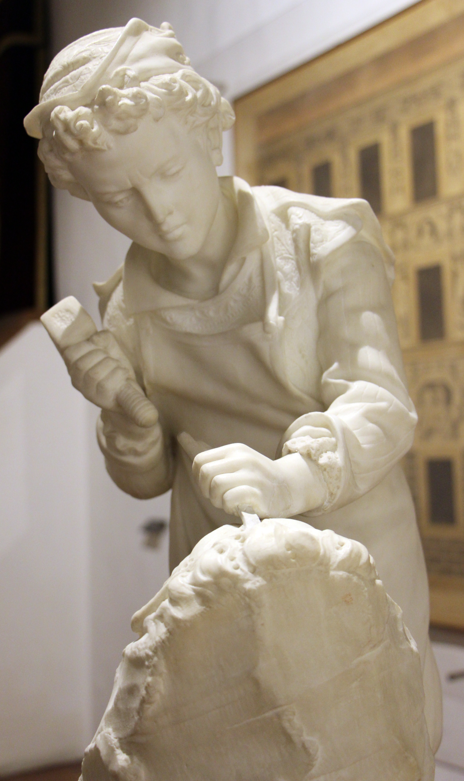 Casa Buonaroti